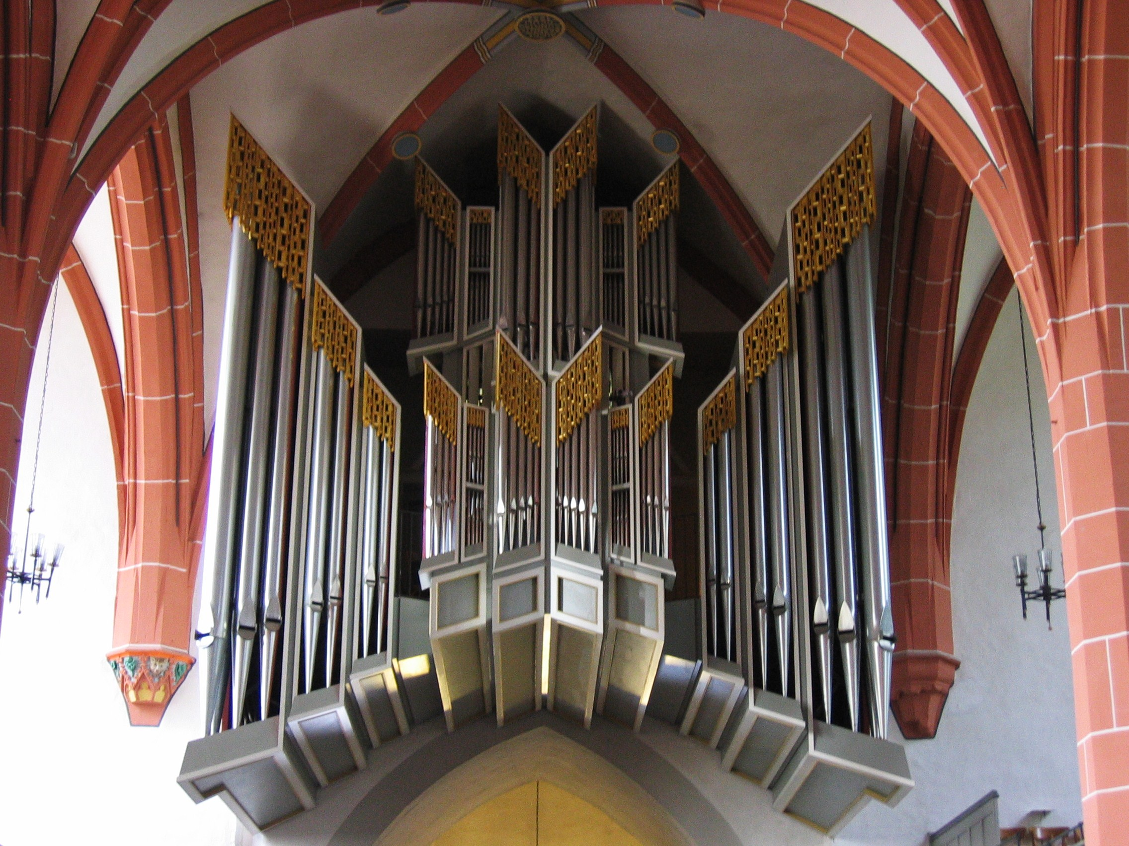 Orgel der Stadtkirche in Bad Hersfeld.